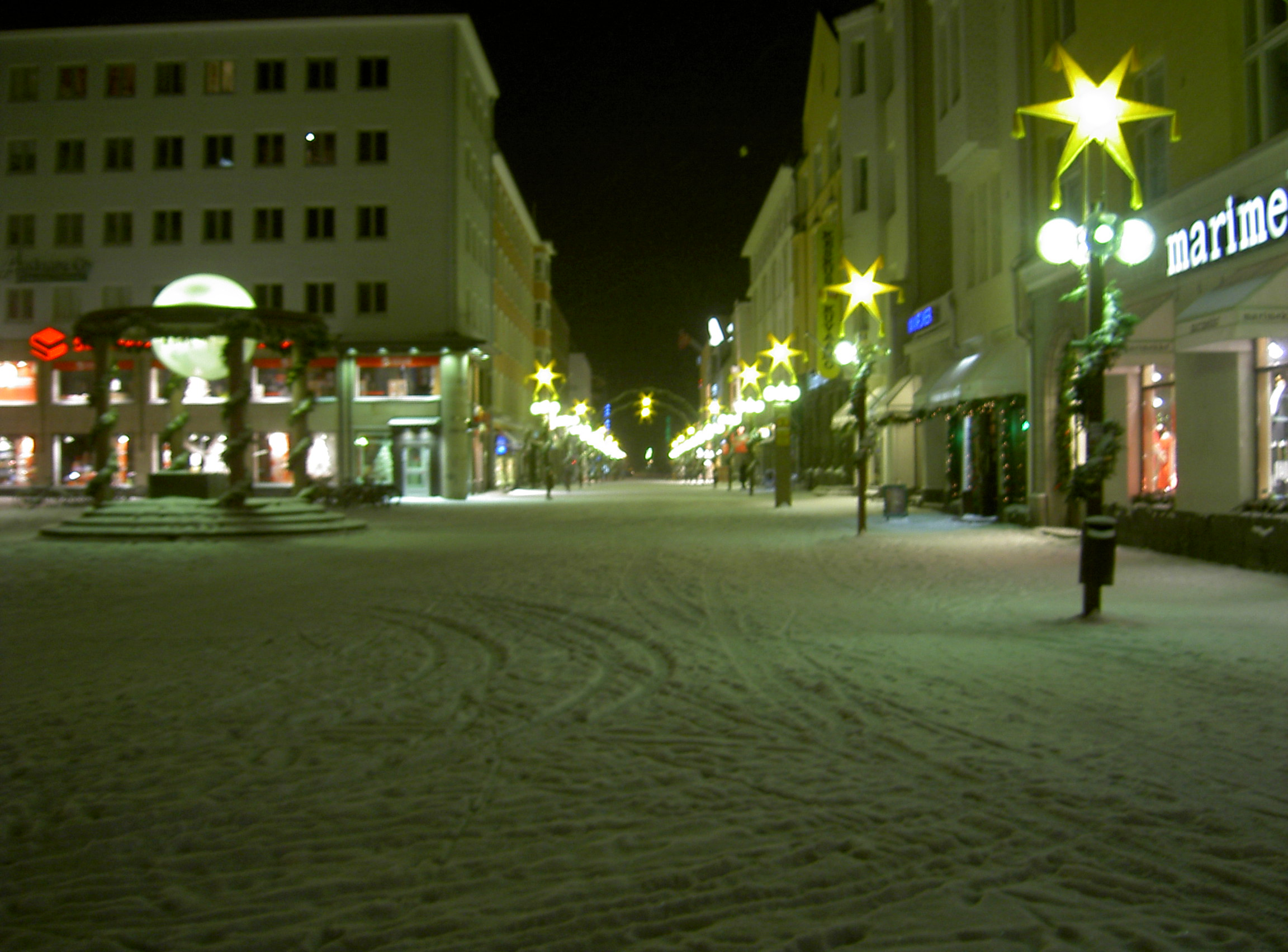 Sajat digitalis kamera.--Math 2005. augusztus 29., 14:31 (CEST) hivatkozando forras: Brendel Matyas